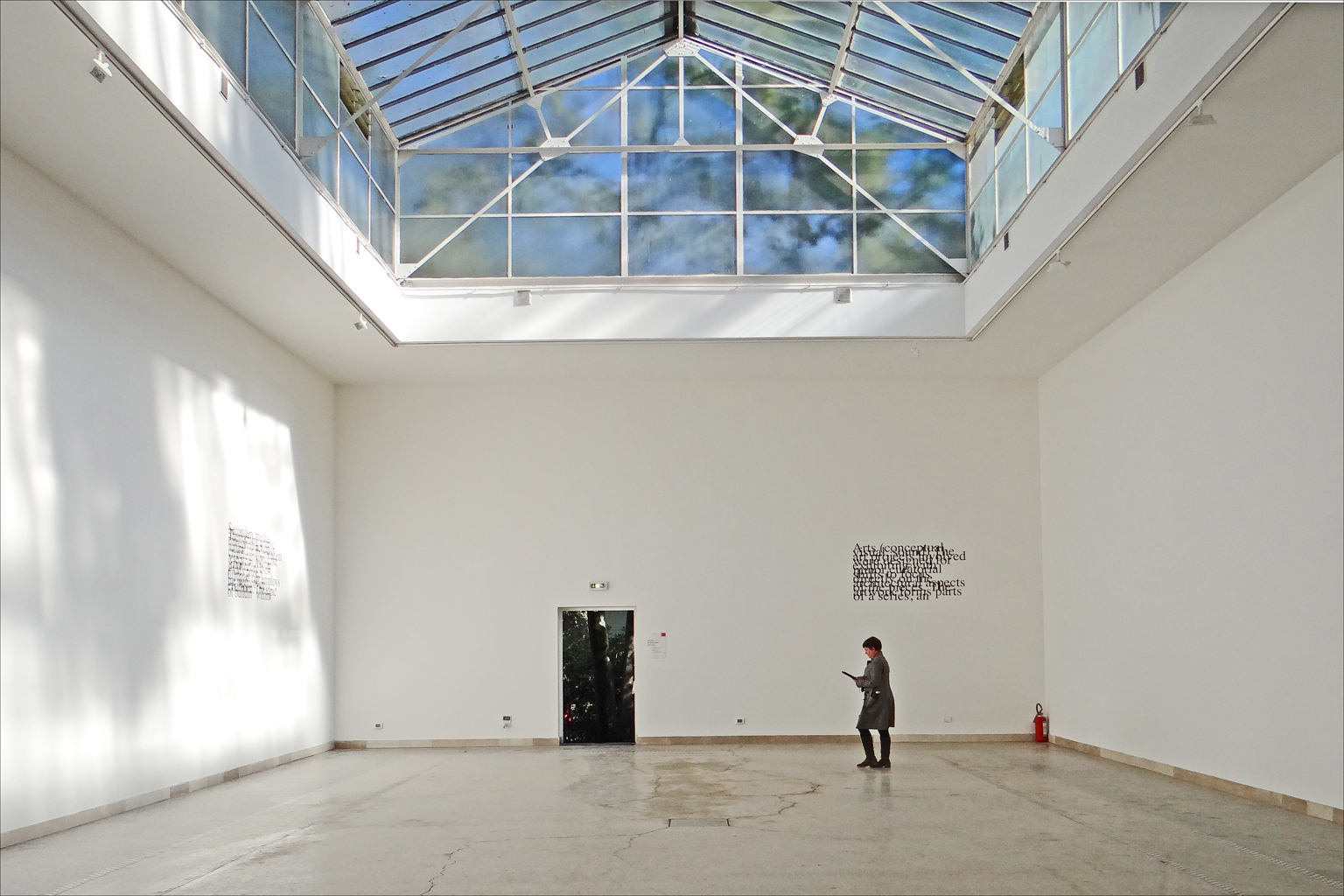 Intérieur du pavillon national des républiques tchèque et slovaque Deux pavillons nationaux de la Biennale d'architecture de Venise, celui associant la Tchéquie et la Slovaquie et celui de la Russie ont pris le parti de la dématérialisation de leurs contenus. Ainsi, l’espace d’exposition du pavillon de l’ancienne Tchécoslovaquie est entièrement vide ; à l’entrée, on distribue aux visiteurs des tablettes tactiles sur lesquelles on peut voir successivement plusieurs expositions interactives virtuelles en réalité augmentée qui apparaissent sur les murs si on se déplace dans la salle. Certaines expositions sont également sonores et nécessitent un casque d’écoute. Si l’intention est méritoire, le résultat n’est guère satisfaisant car la lumière ambiante est bien trop importante pour la luminosité des écrans, les reflets perturbant fortement la visualisation car aucune occultation de la verrière du toit n’a été prévue. De plus, la qualité graphique des applications se révèle médiocre et leur intérêt n’est pas suffisant pour maintenir l’attention des visiteurs au-delà de quelques minutes. Je conseille de visiter leur site web qui est plus intéressant ! A la différence de cette expérimentation, la dématérialisation sur tablette tactile des contenus du pavillon de la Russie est une bien plus grande réussite scénographique. voir les photos du pavillon russe Site du pavillon national commun aux républiques tchèque et slovaque askingarchitecture.sk/en Le pavillon tchécoslovaque (aujourd'hui tchèque ou slovaque en alternance) fut inauguré en 1926. Il est l'œuvre de l'architecte Otakar Novotný dans un style très dépouillé. Extrait de Wikipedia